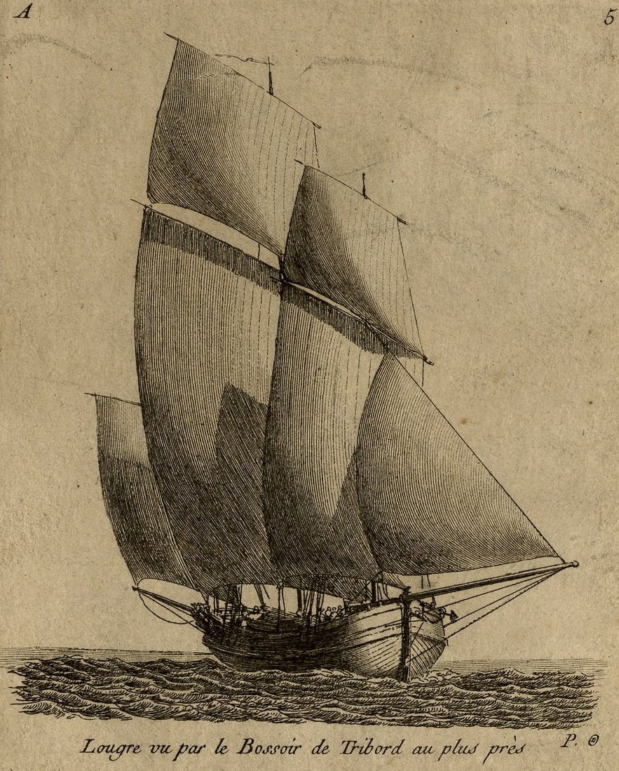 Dessin de Pierre Ozanne, gravé par Yves Le Gouaz. Bibliothèque nationale de France.